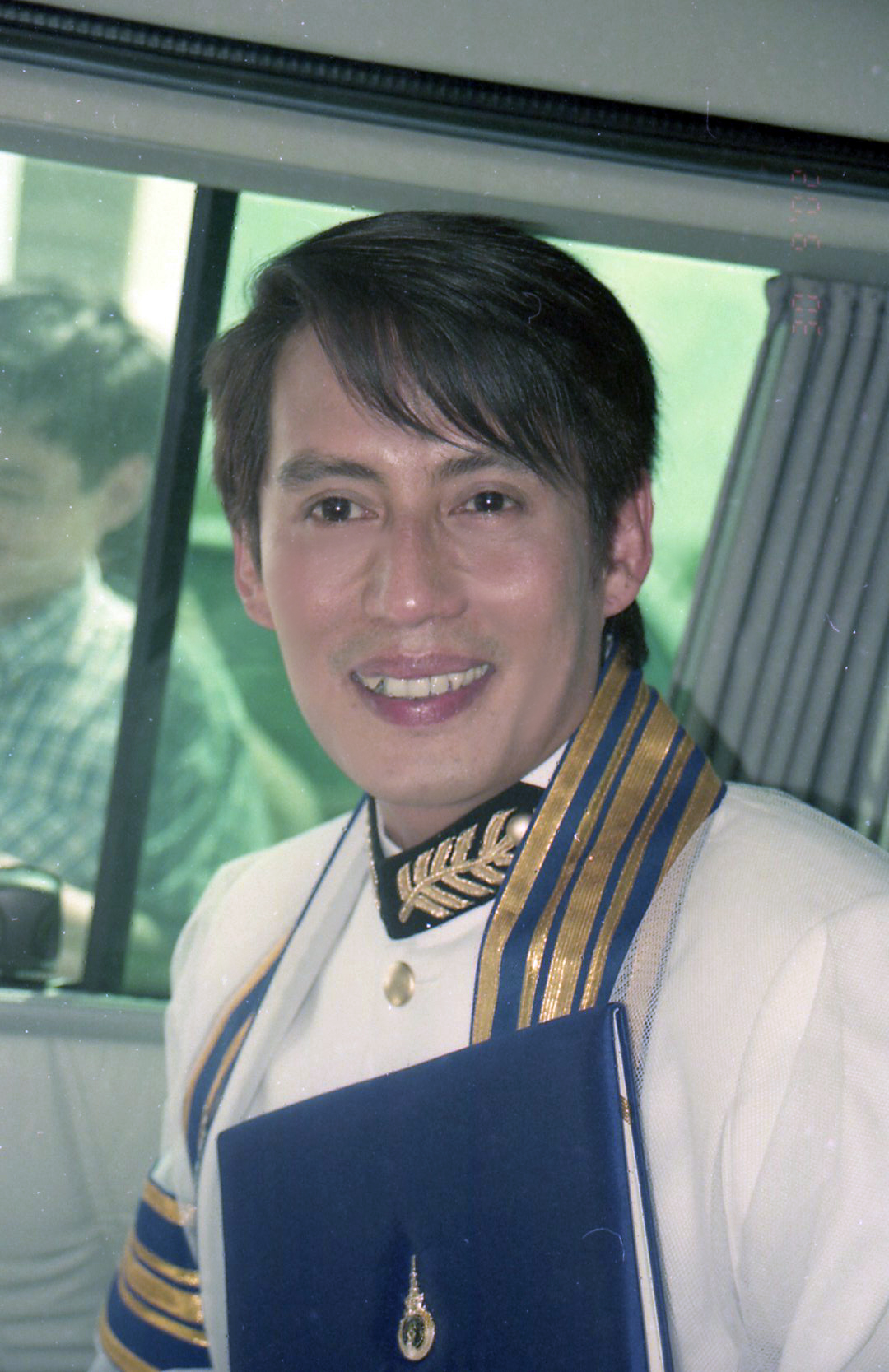 ธงไชย แมคอินไตย์ รับปริญญากิตติมศักดิ์ จากมหาวิทยาลัยราชมงคล ปี พ.ศ. 2545